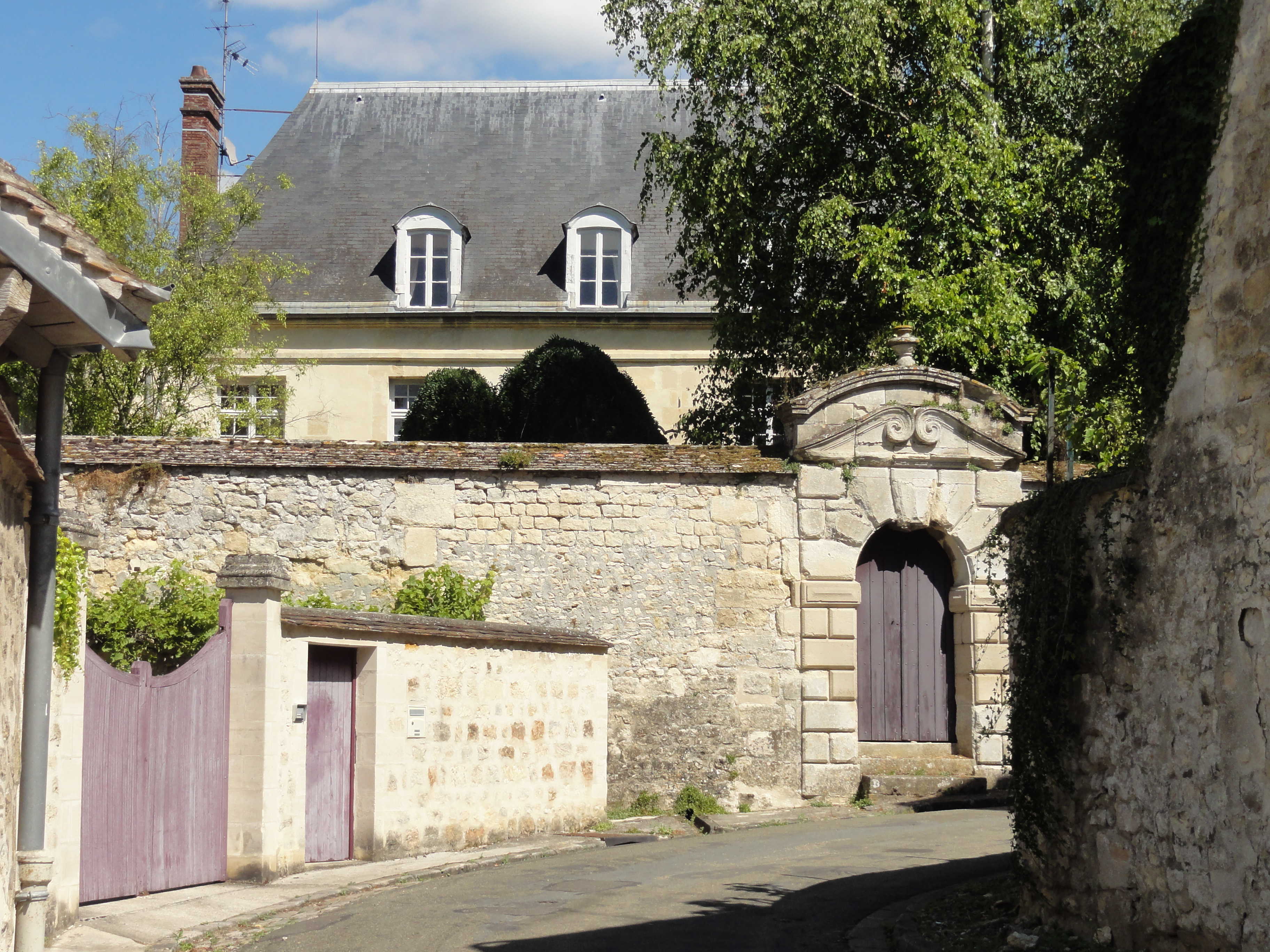 Château, côté ouest rue du Moulin.